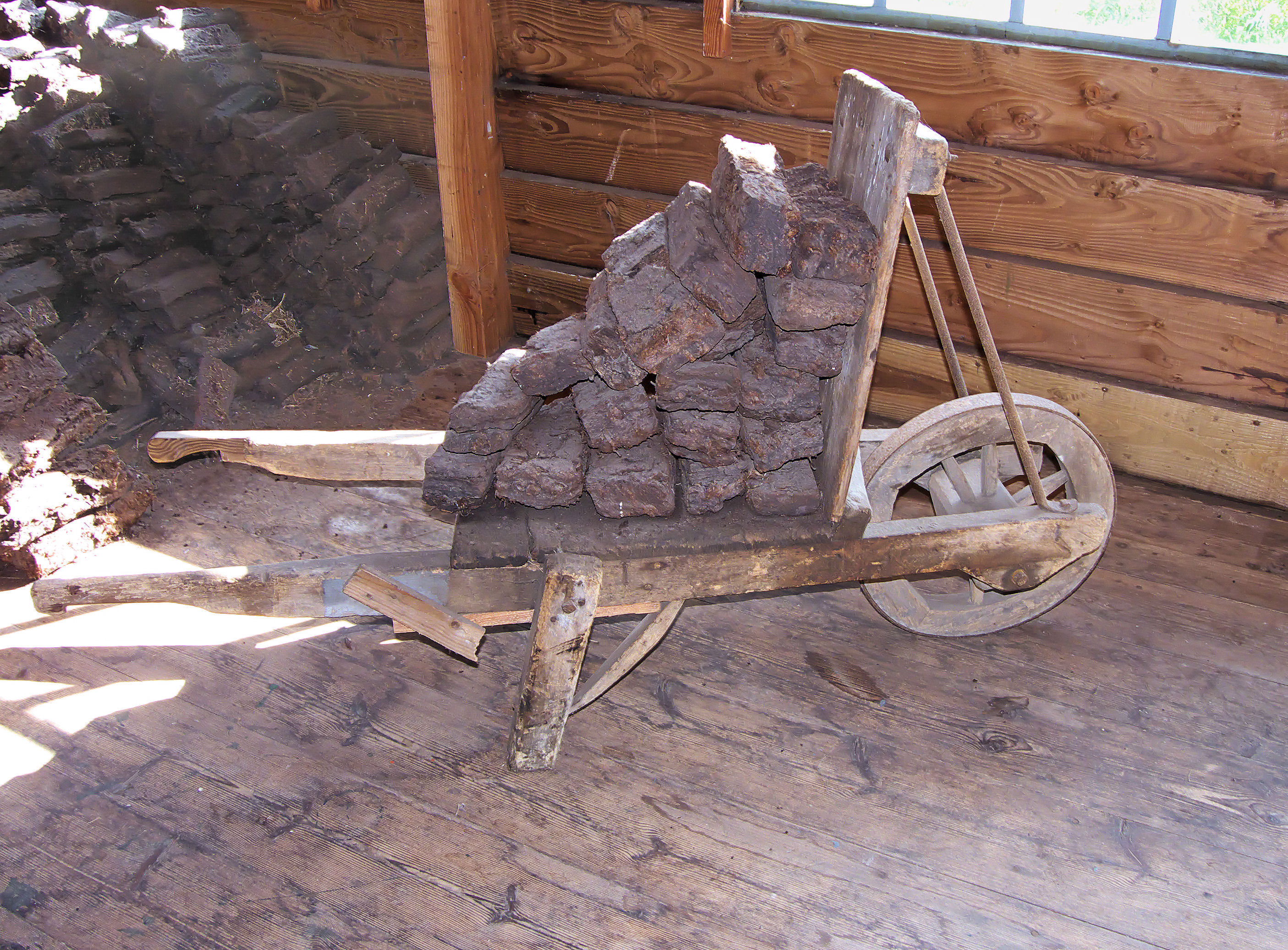 Kruiwagen met turf van de Schoolmeester